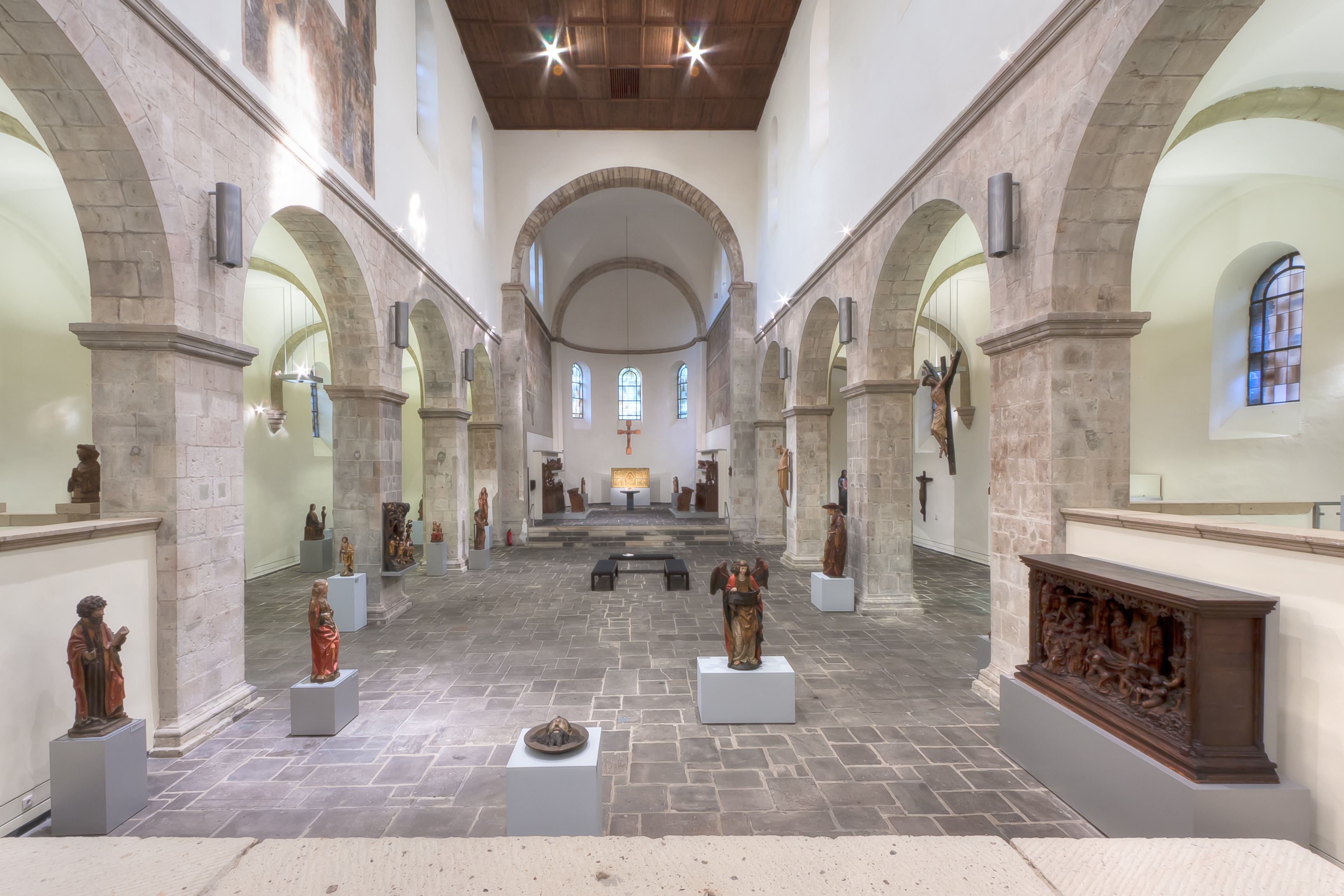 Museum Schnütgen, Köln. Innenaufnahme